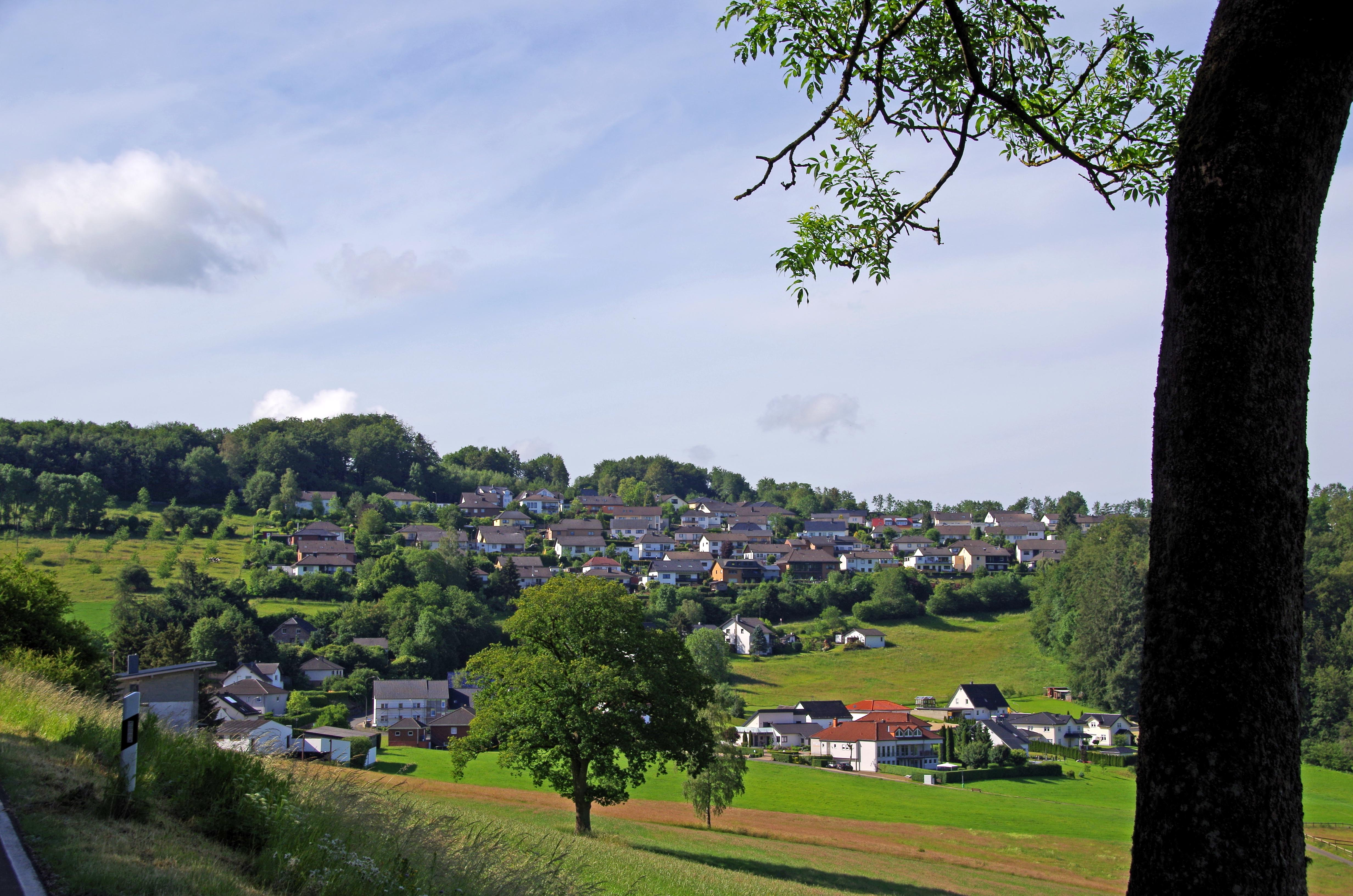 Dausfeld